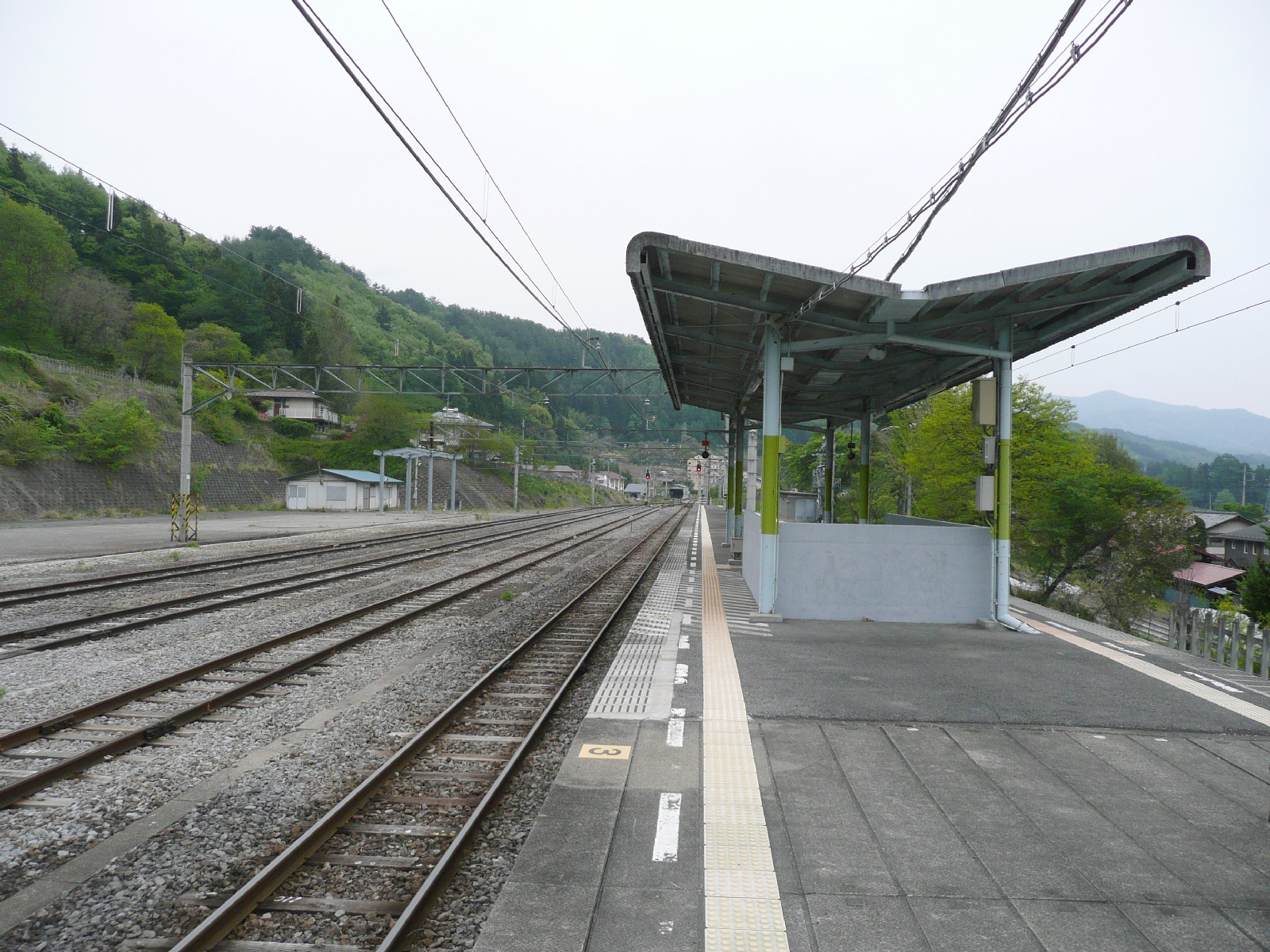 羽根尾駅ホーム